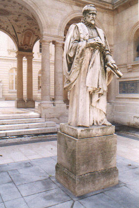 Guillaume Budé, Denkmal in Paris Located in Collège de France.[1]